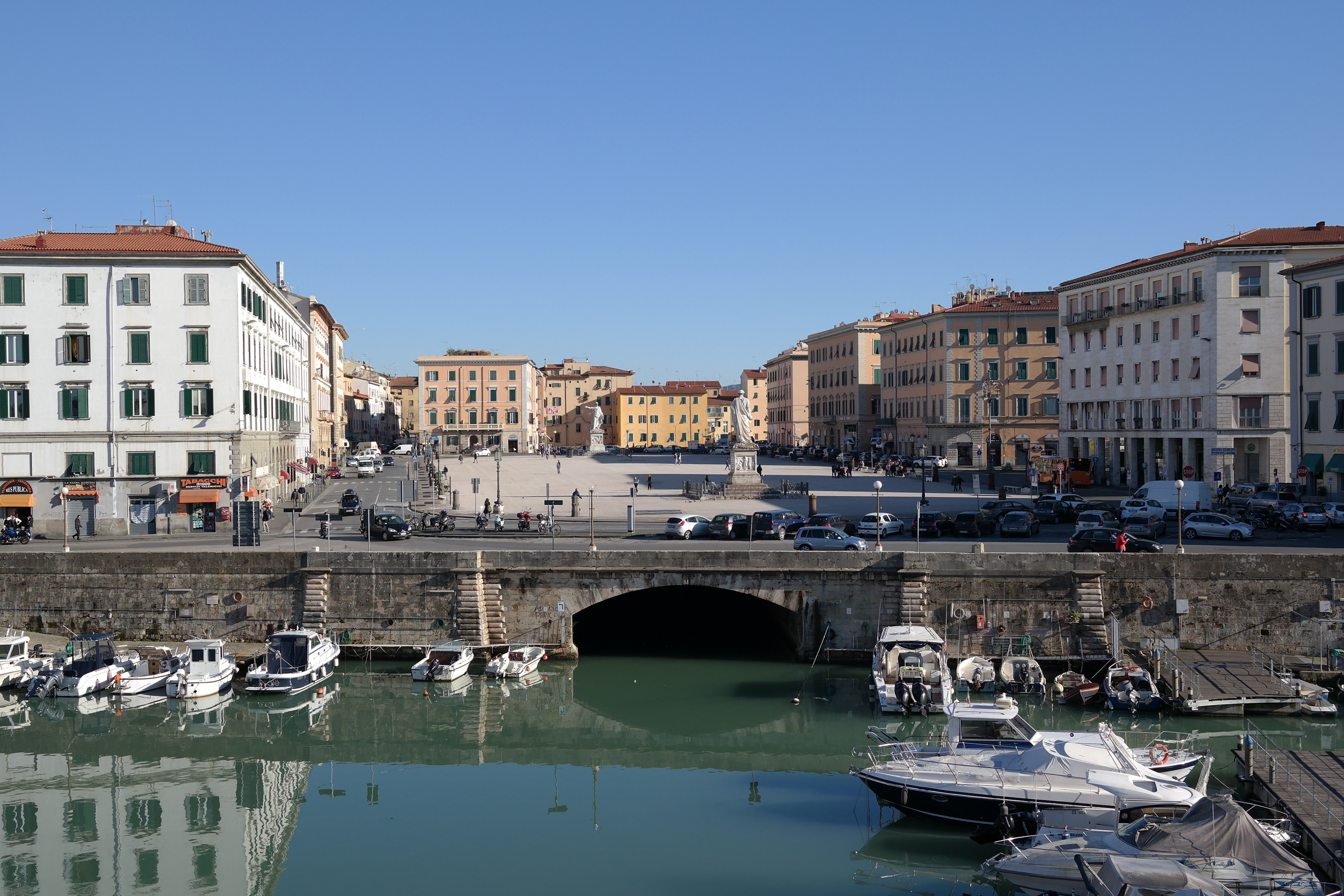 Piazza della Repubblica vista dalla Fortezza Nuova a Livorno